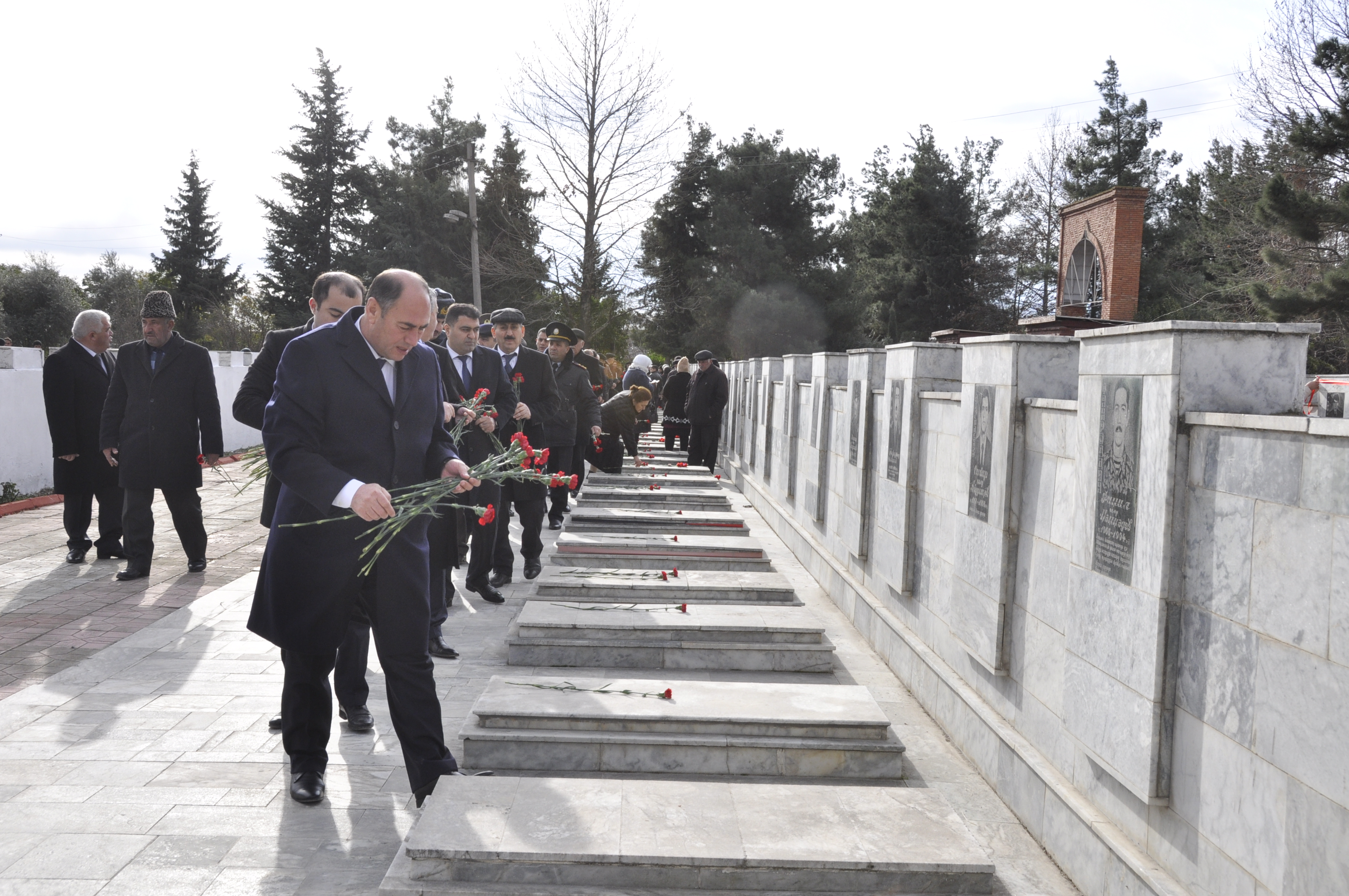 Vidadi İsayev Bərdə Şəhidlər Xiyabanında